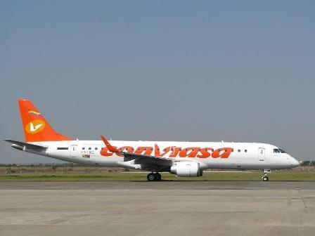 Primer E190 de Conviasa